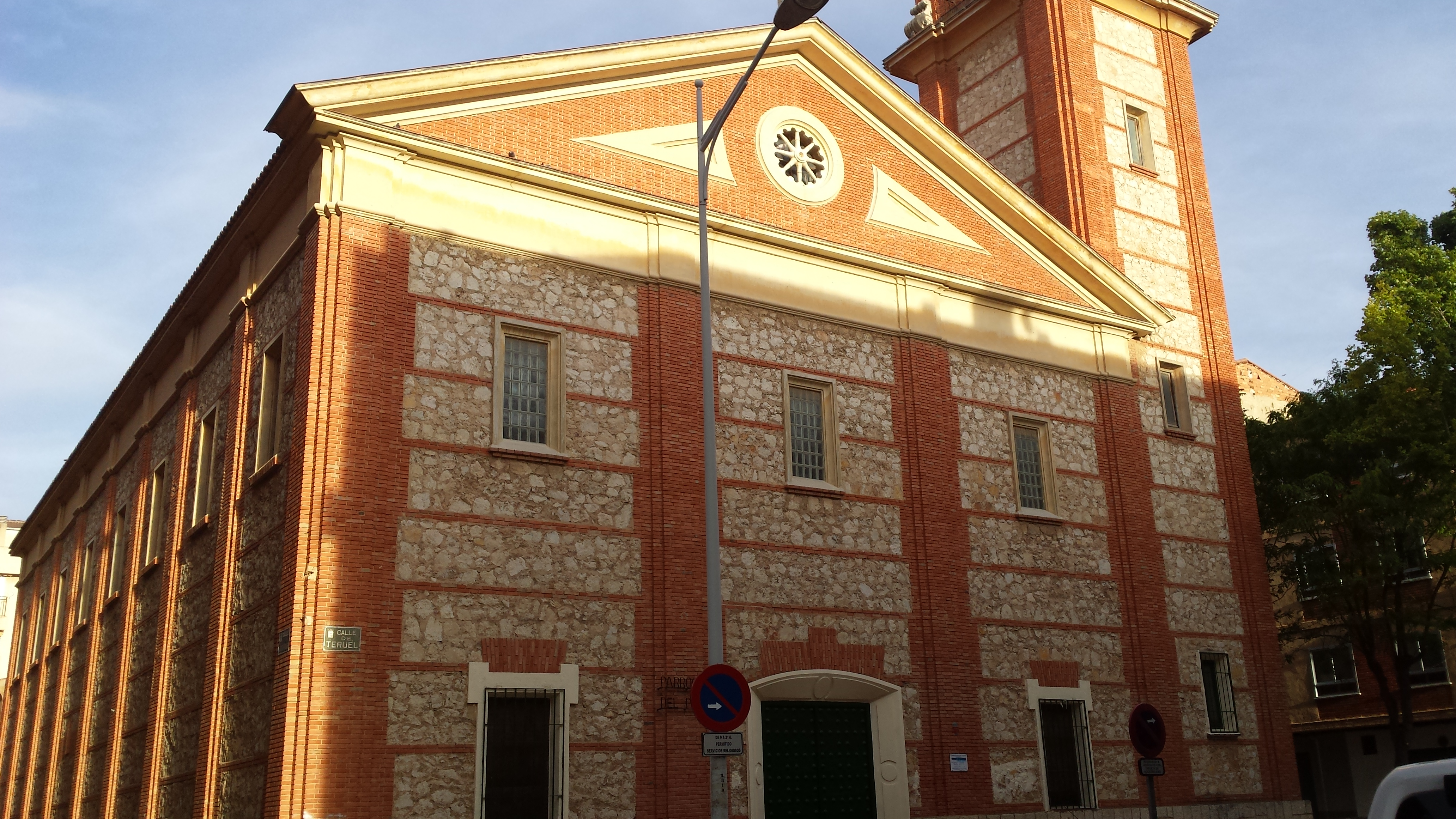 Iglesia del Pilar (Albacete).